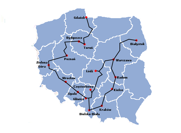 Schemat sieci optycznej PIONIER (2003)